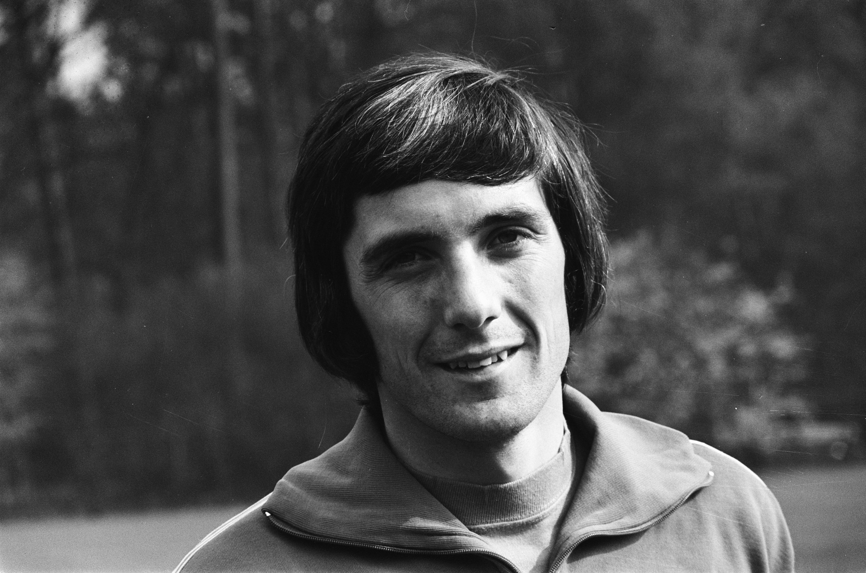 Collectie / Archief : Fotocollectie Anefo Reportage / Serie : Selectie van het Nederlands elftal, bijeen in Zeist Beschrijving : Adrie van Kraaij Annotatie : Randnummer negatiefstrook: 3 Datum : 28 april 1975 Locatie : Utrecht, Zeist Trefwoorden : portretten, selecties, sport, voetbal, voetballers Persoonsnaam : Kraaij, Adrie van Fotograaf : Mieremet, Rob / Anefo Auteursrechthebbende : Nationaal Archief Materiaalsoort : Negatief (zwart/wit) Nummer archiefinventaris : bekijk toegang 2.24.01.05 Bestanddeelnummer : 927-8978